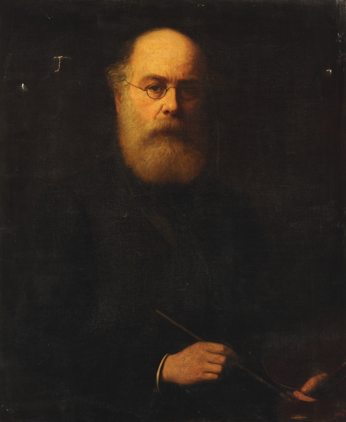 Self-portrait